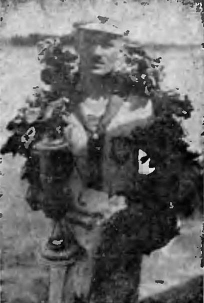 Władysław Nadratowski